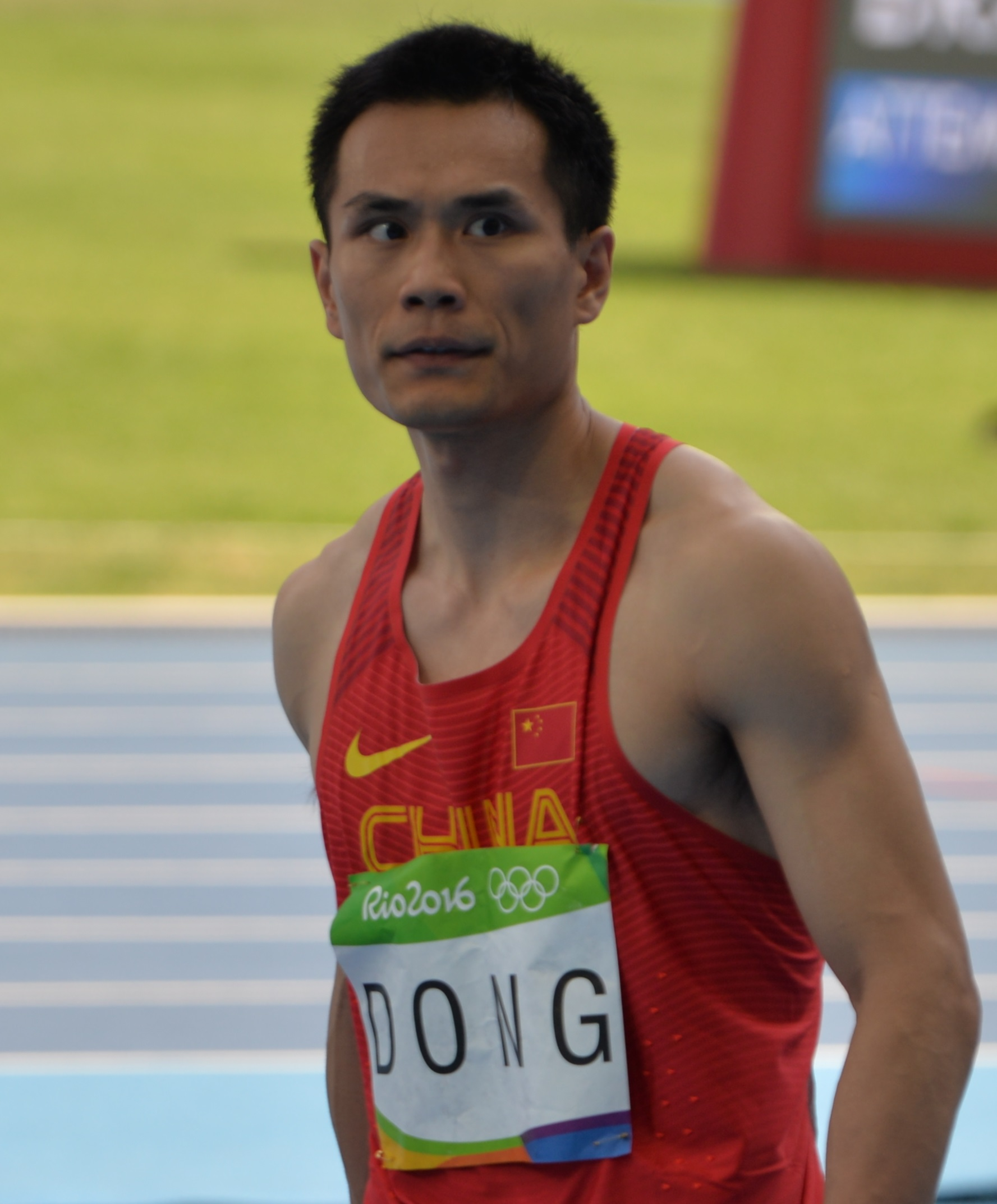 Dong Bin le médaillé de bronze du concourt de triple saut aux jo de Rio 2016